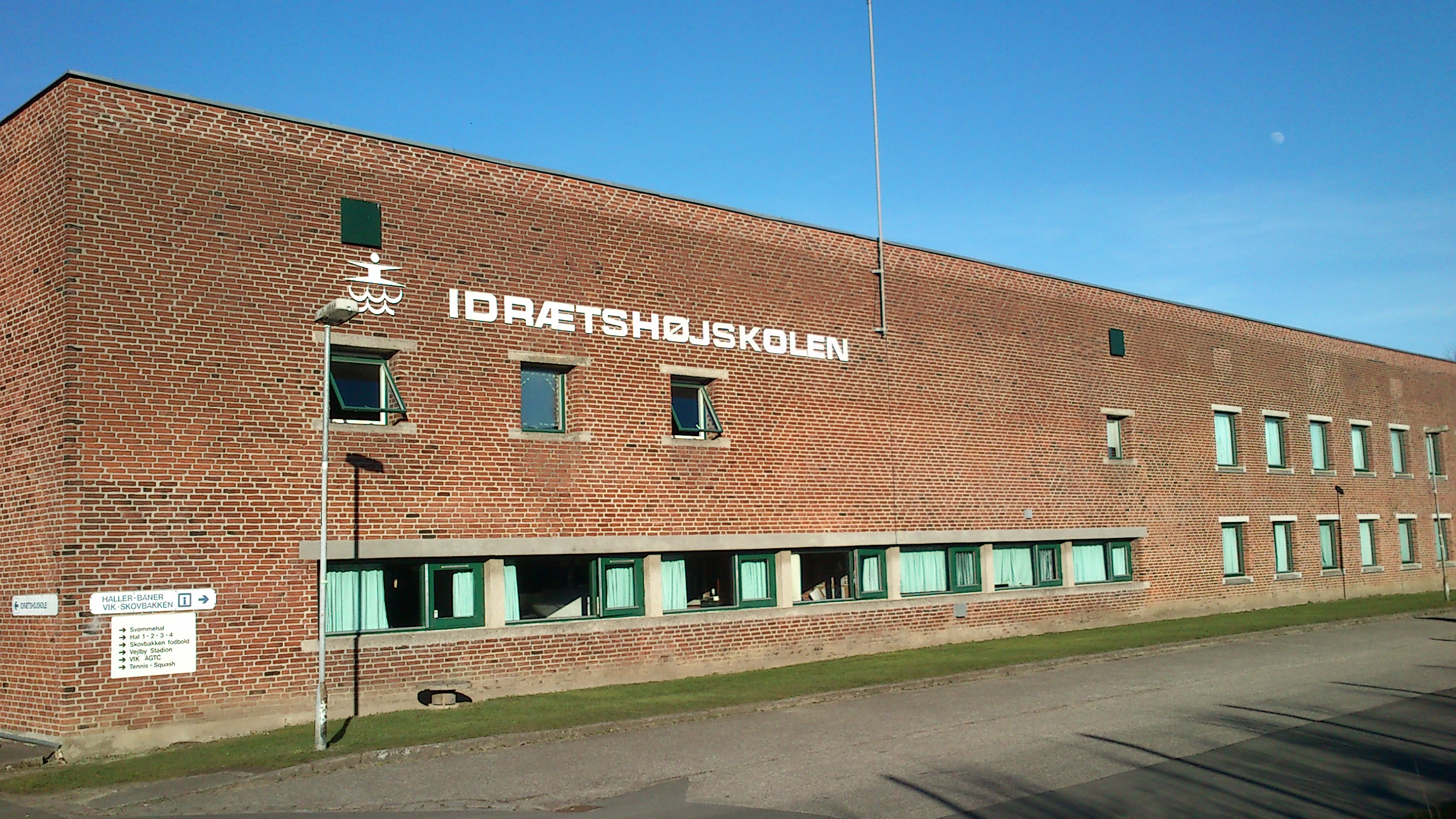 Idrætshøjskolen Aarhus.